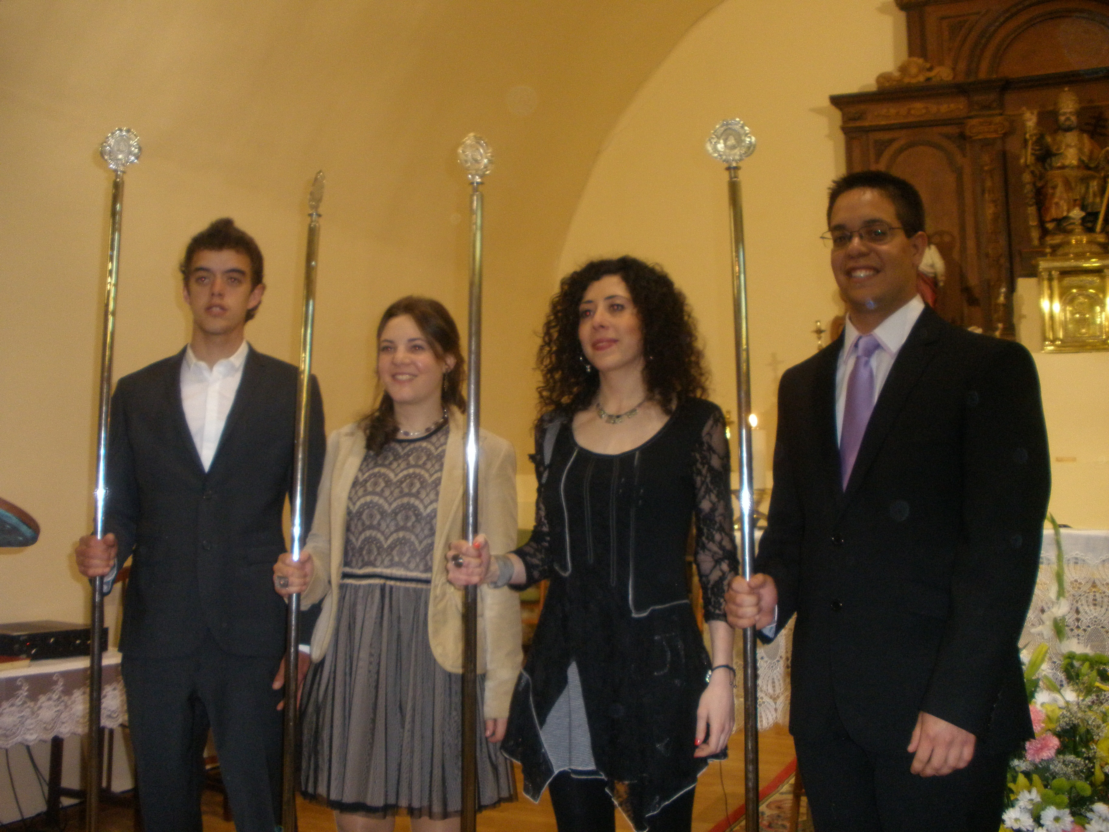 Esta son los cofrades que han servido las fiestas en el 2013.